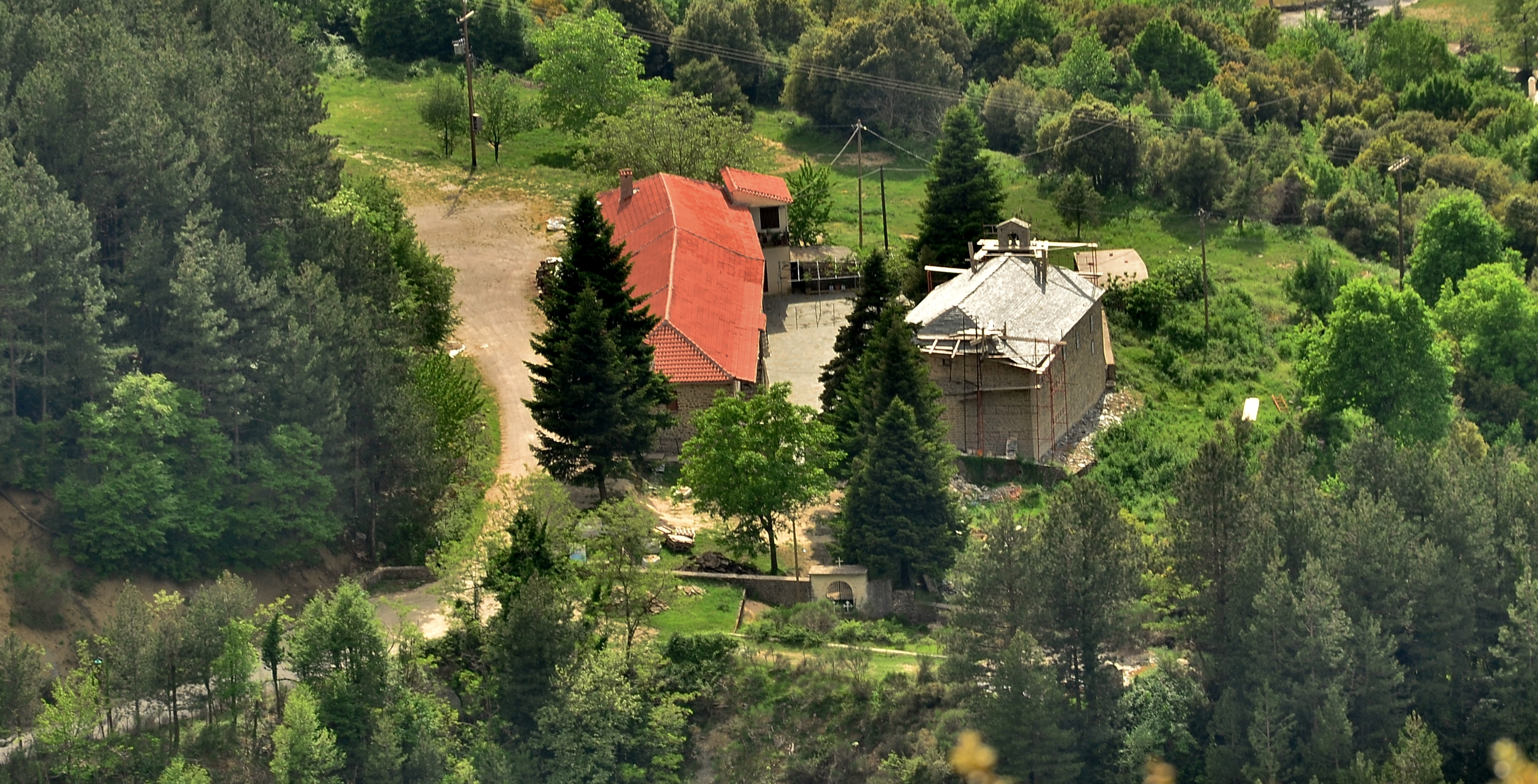 Η Μονή Αγίας Αικατερίνης Άρτας από παρακείμενο λόφο